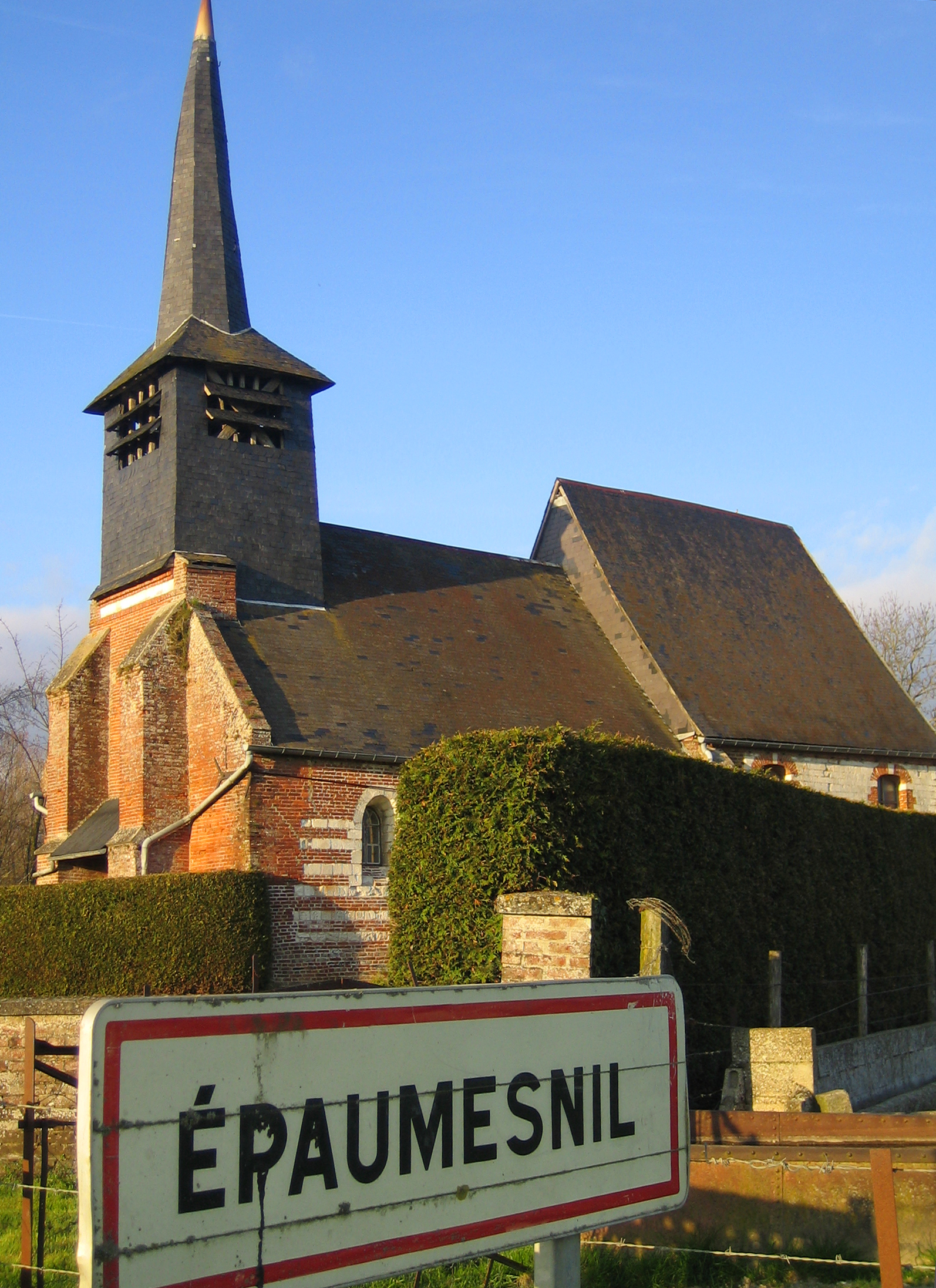 Epaumesnil (Somme, France)